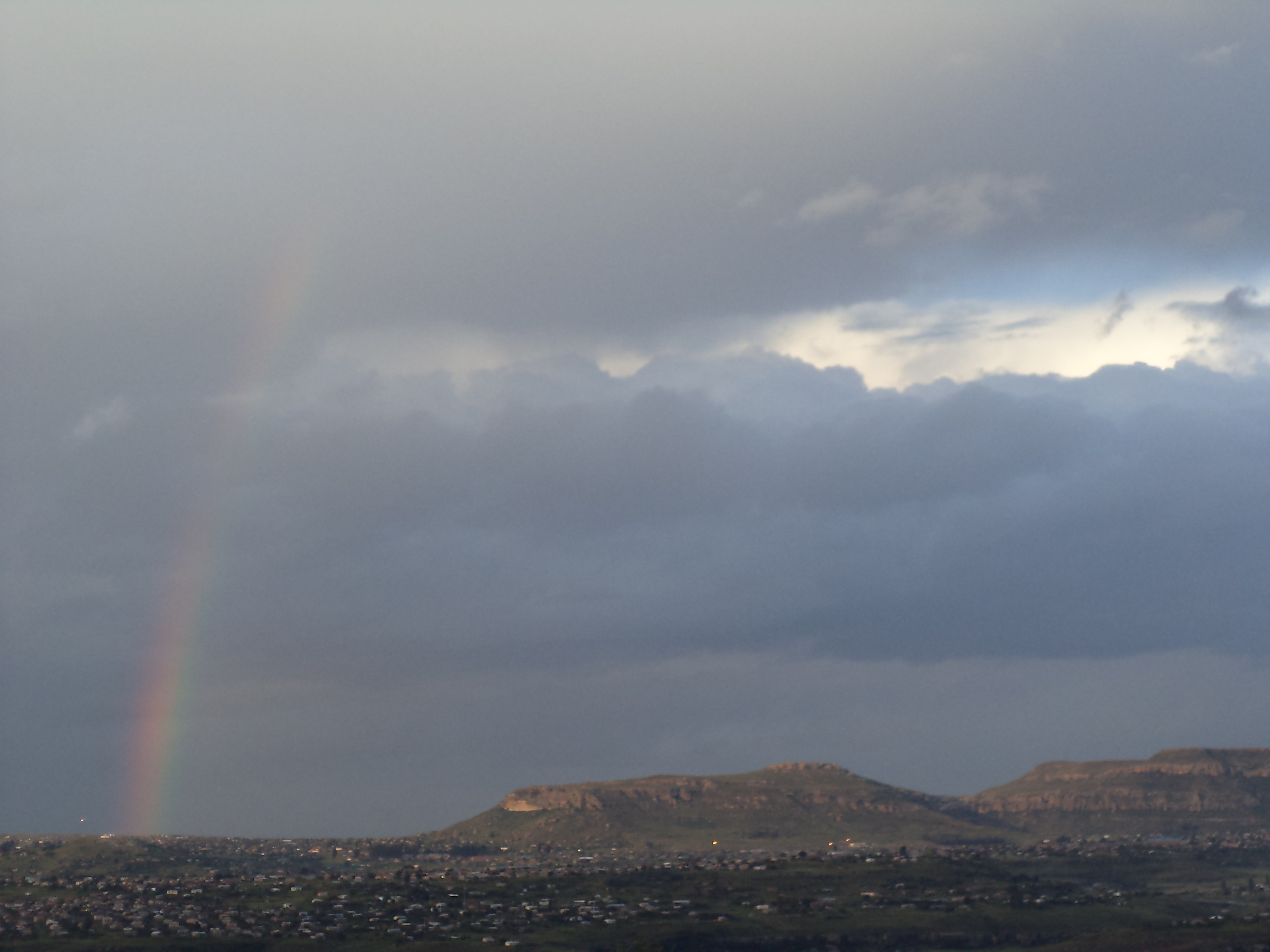 QwaQwa. Dit was Witsieshoek eers genoem lank terug